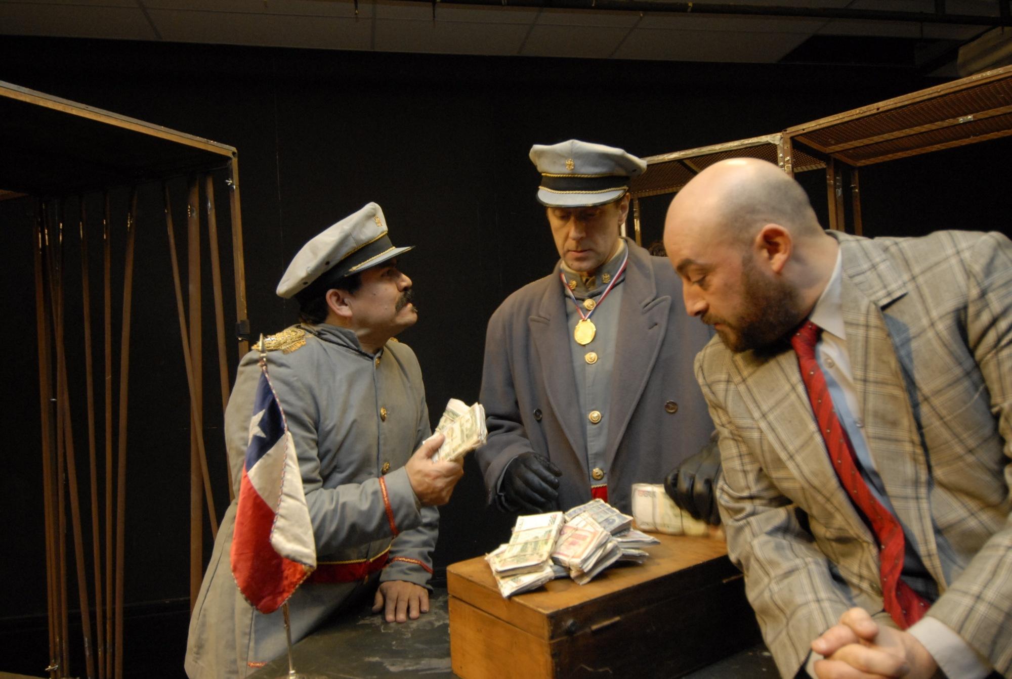 Teatro chileno Obra "El avión rojo" por el Teatro de la Universidad Católica. Compañía: La Batería Director: Hernán Lacalle Actores: Pablo Krogh, Sergio Schmied, Pablo Macaya, Mario Soto, Claudio Rojas, Omar Guede y Sebastián Plaza